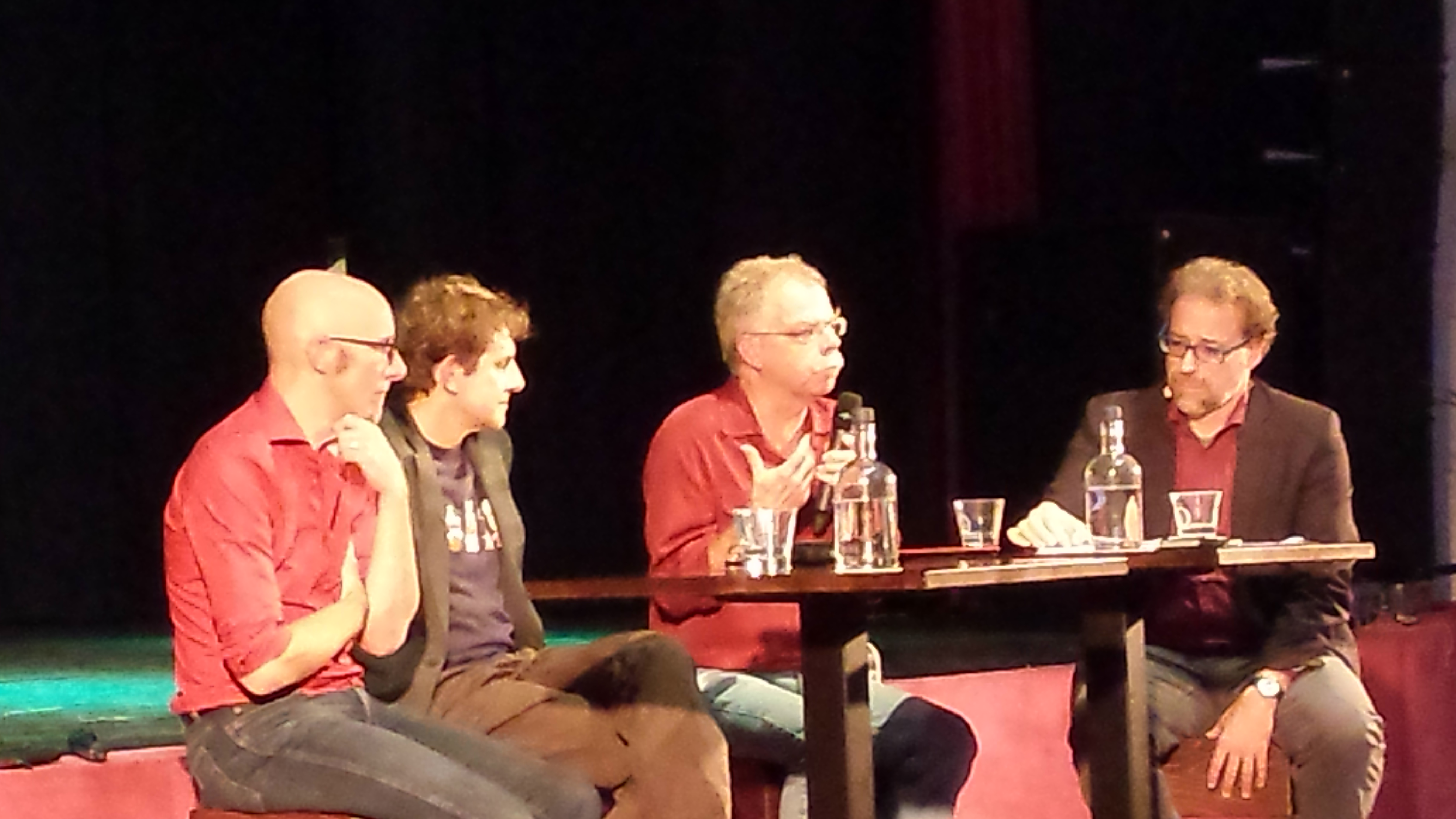 Discussie over skepticisme in de media. Van links naar rechts: Alexander Pleijter, Martijn van Calmthout, Hans van Maanen en Herman de Regt. Skepsis Congres 2015, Nieuwe Buitensociëteit Zwolle.